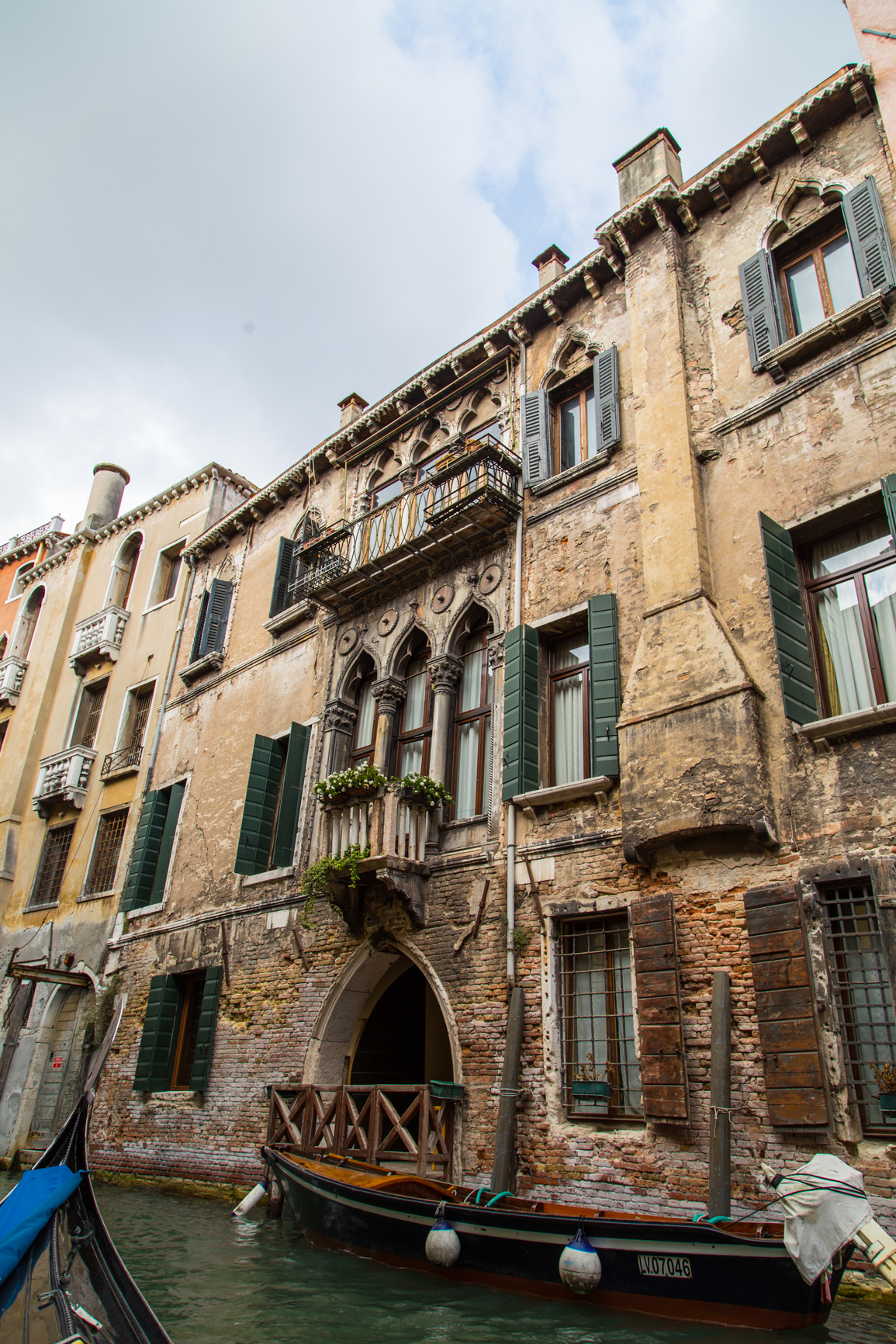 Venezia-Murano-Burano, Venezia, Italy